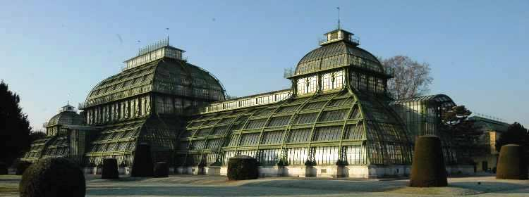 Palmenhaus im Schlosspark Schoenbrunn